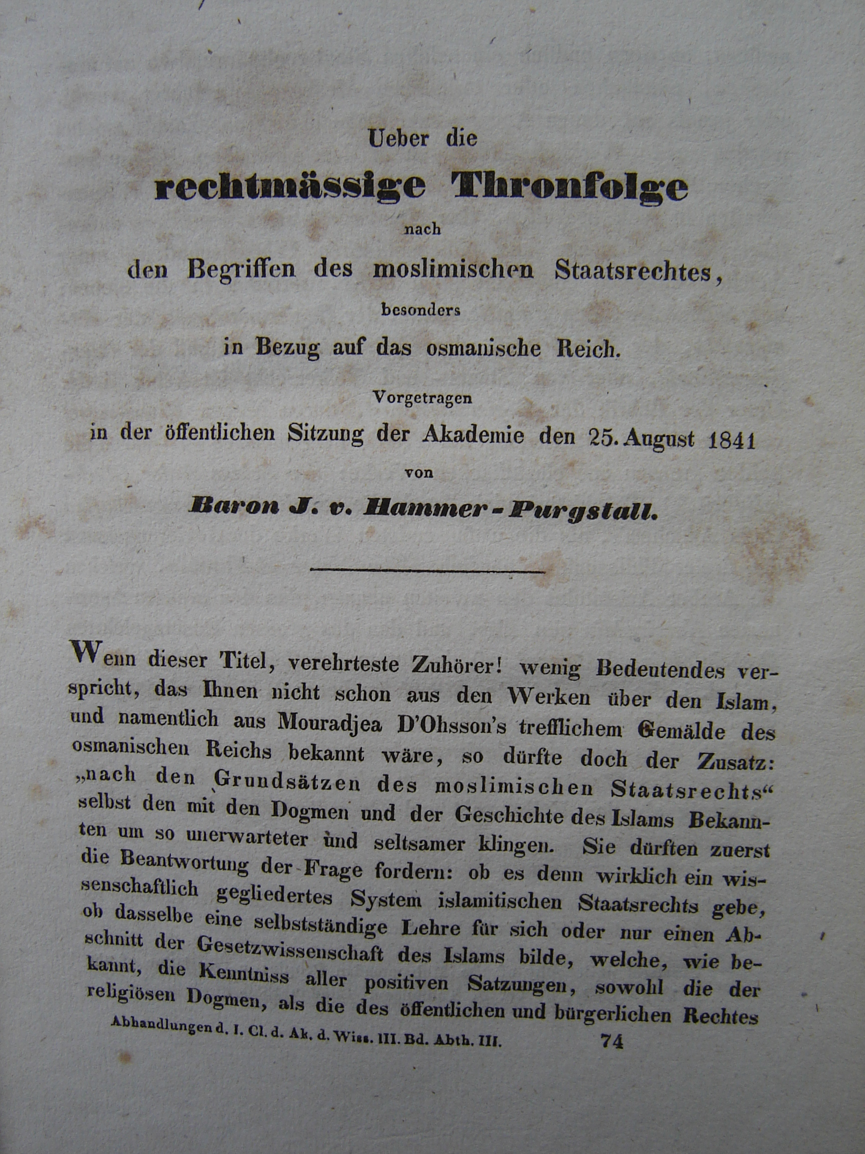 Originaldruck eines Vortrages von J.v.Hammer-Purgstall (Wien 1841)